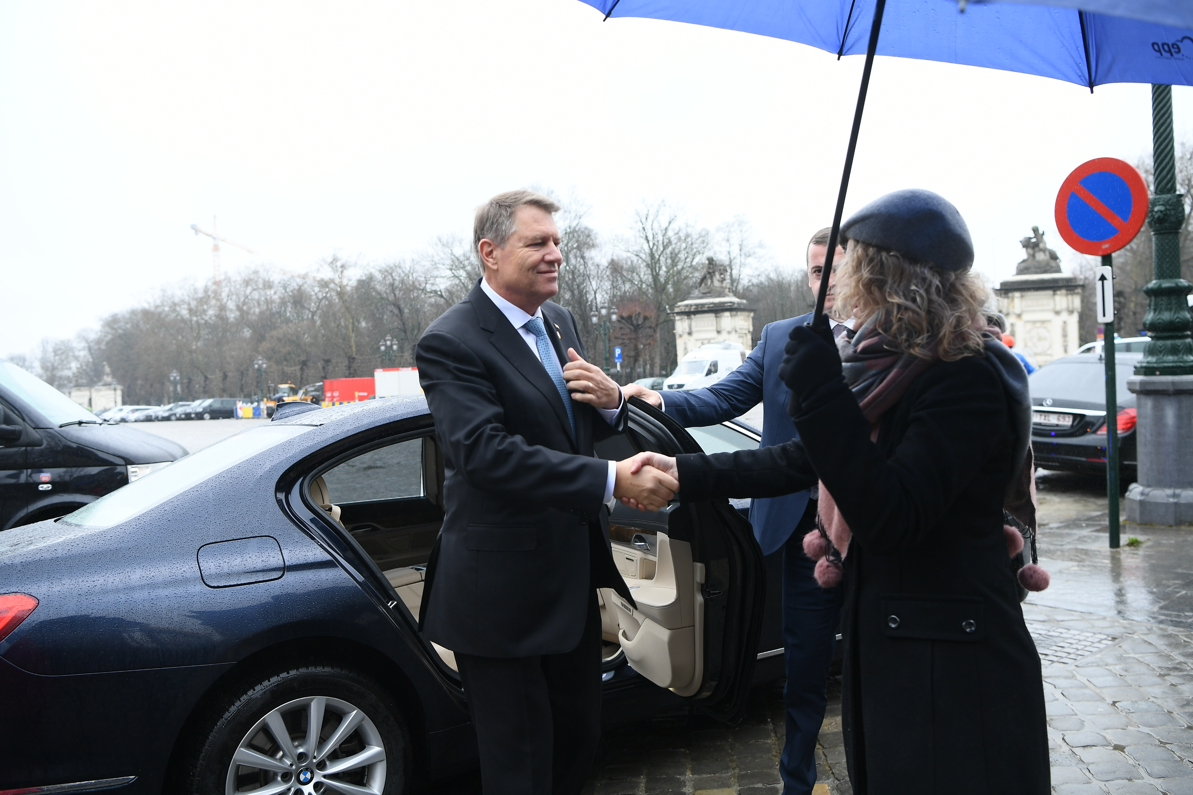 EPP Summit, 22 March 2018